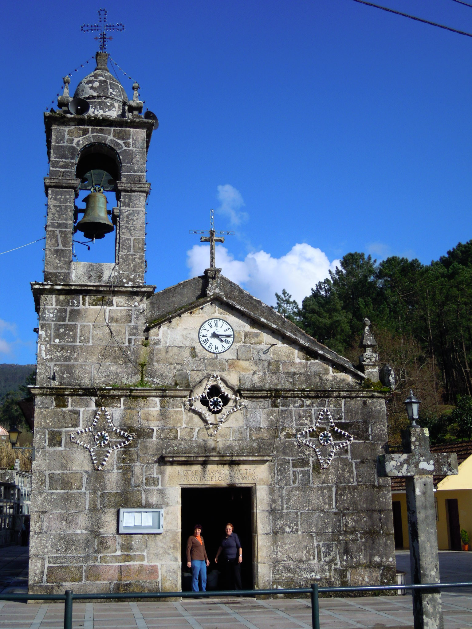 Igrexa parroquial de Atios (O Porriño)